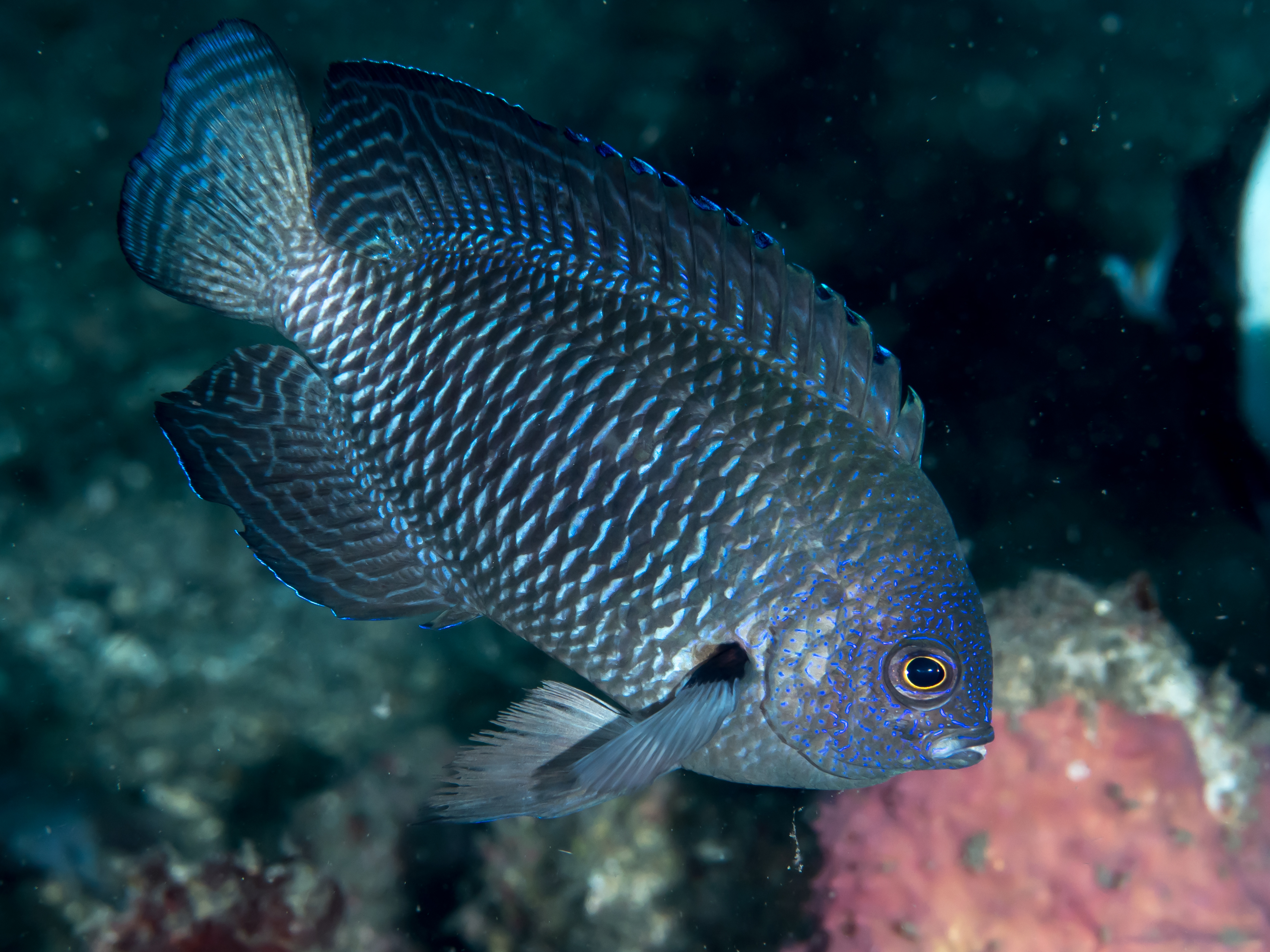 Lembeh, Indonesia - Nagasaki damsel (Pomacentrus nagasakiensis)